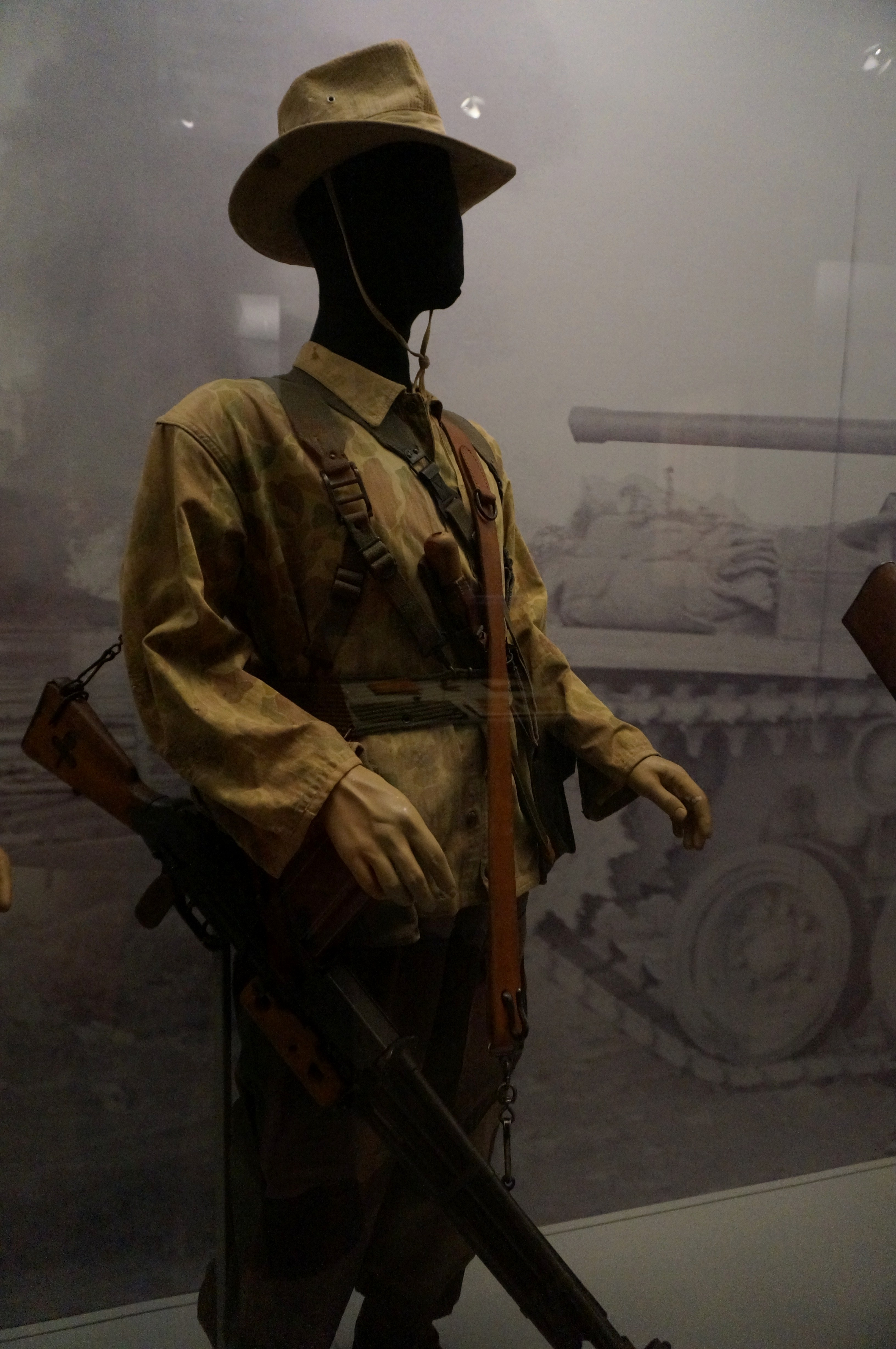 présenté lors de l'exposition Indochine des territoires et des hommes 1856.